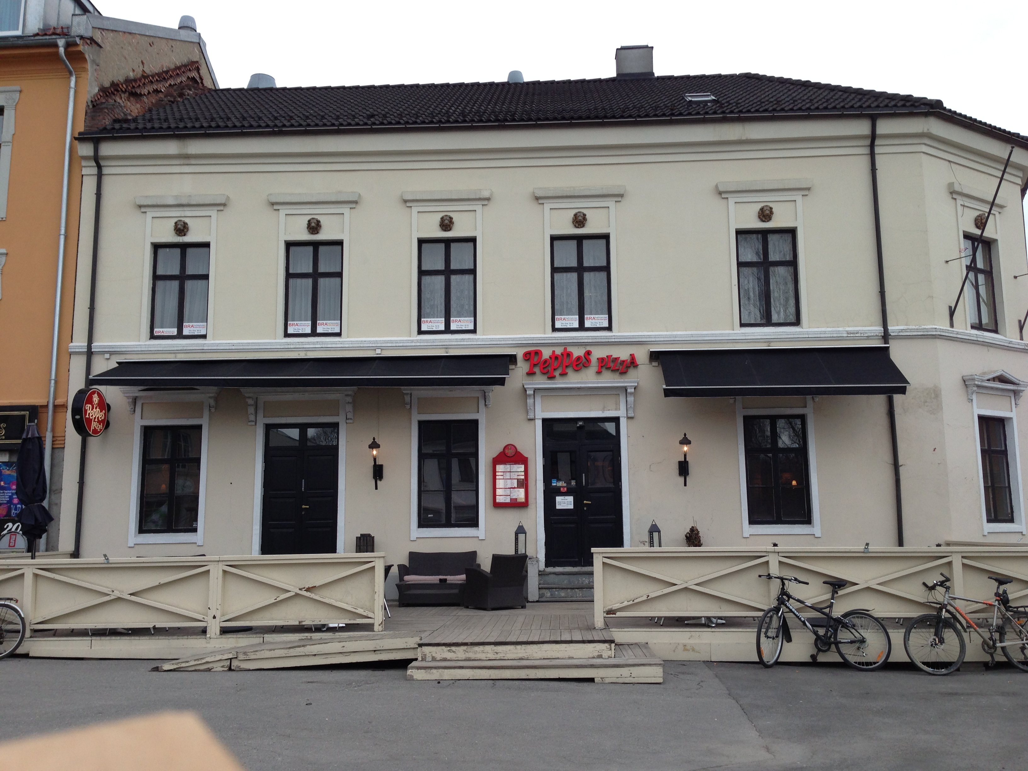 Peppes Pizza i Hønefoss.